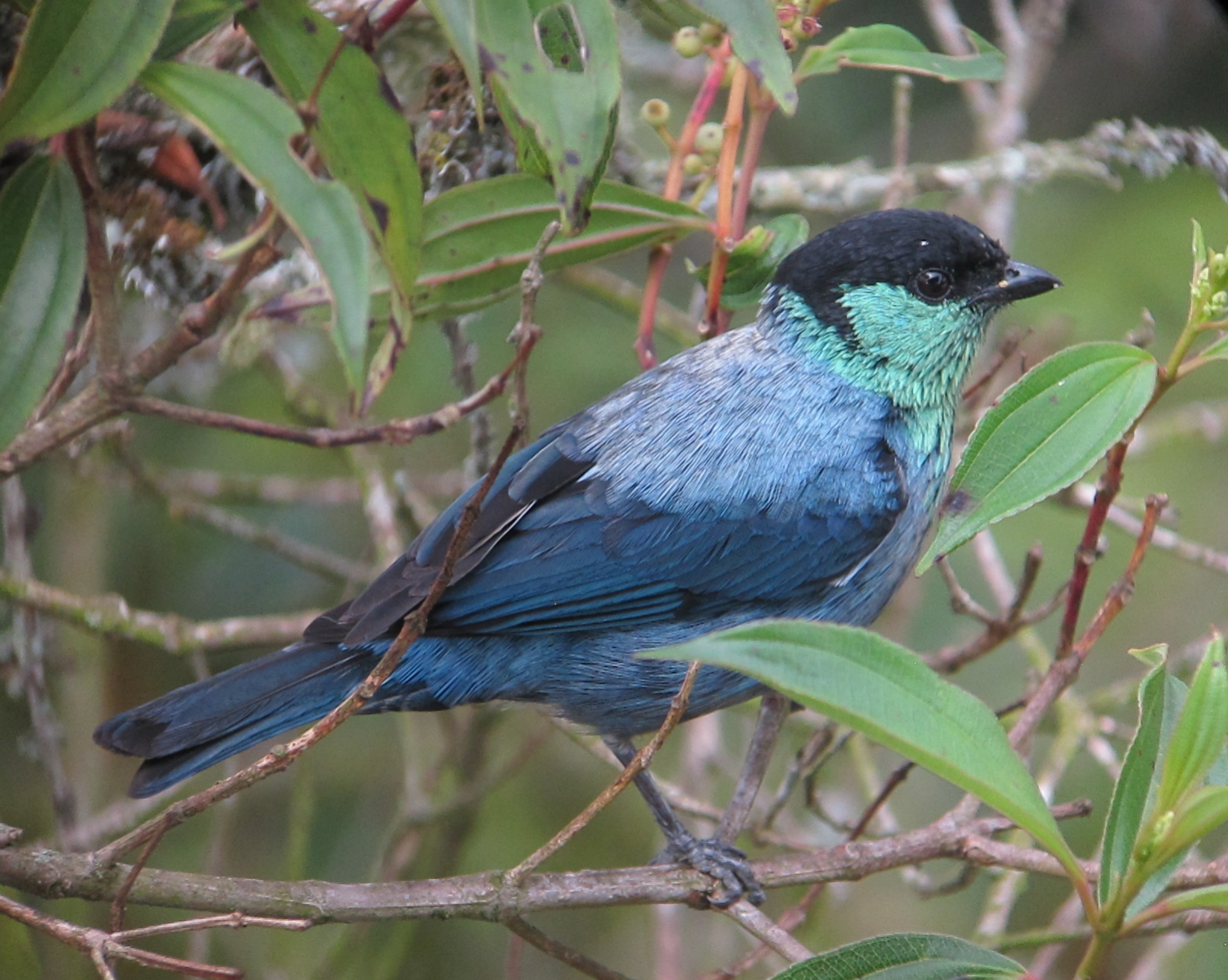 Rionegro, Antioquia, Colombia